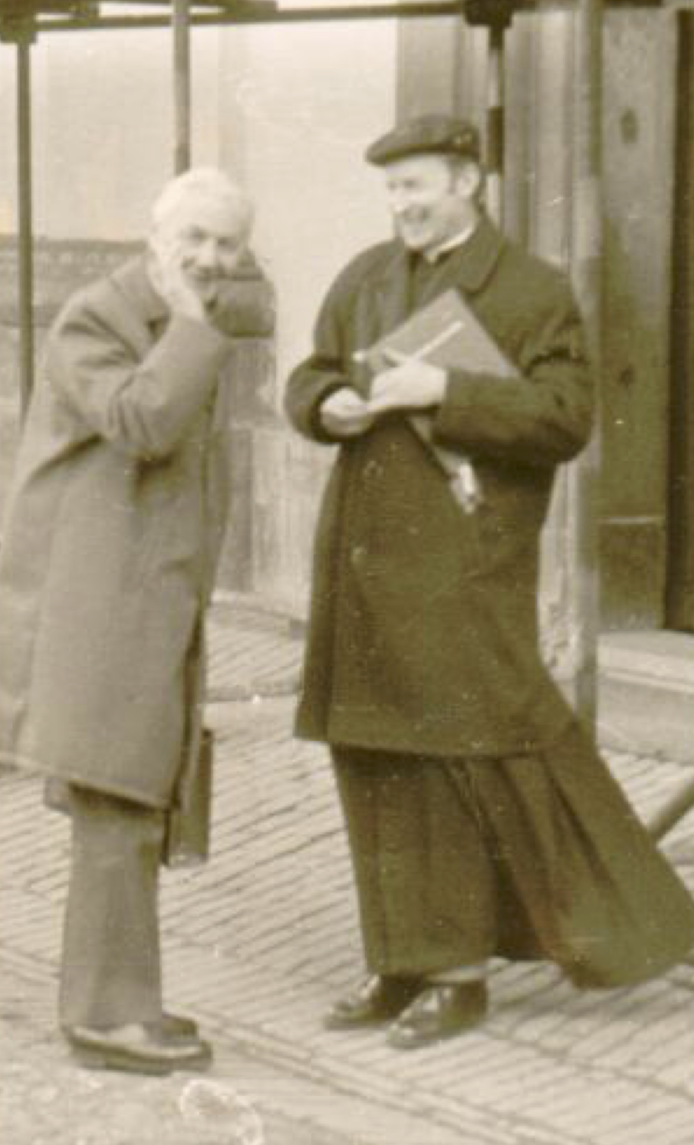 P. Josef Knödl v klerice a P. Josef Olejník stojící zleva před katedrálou v Litoměřicích kolem roku 1976, kdy vyučovali na Cyrilometodějské bohoslovecké fakultě.